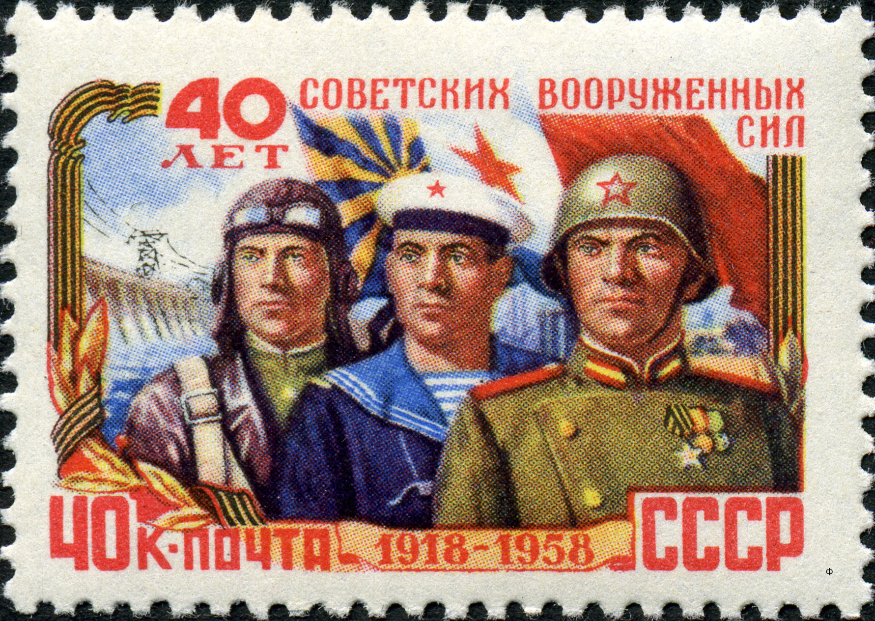 Марка СССР